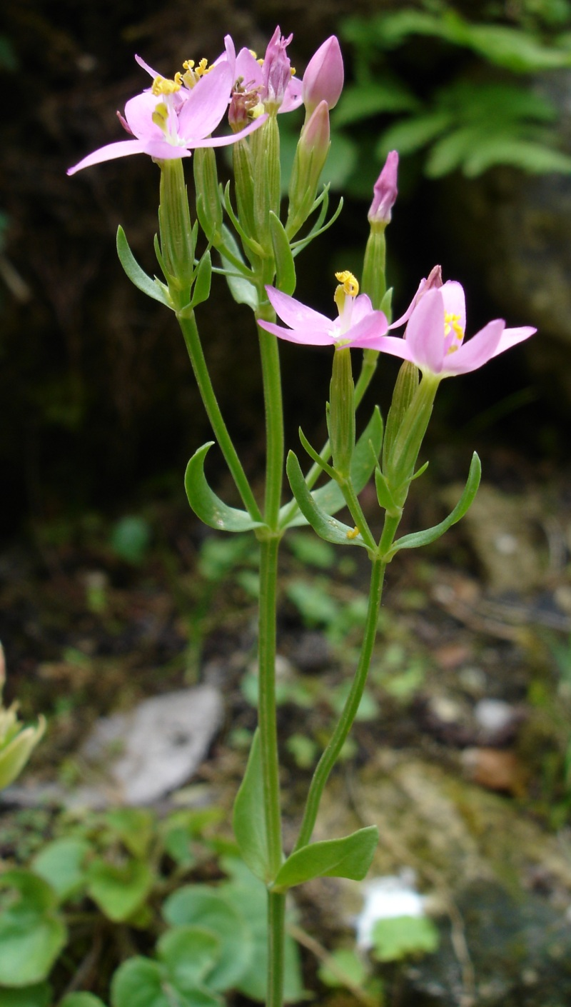 Description: Petite Centaurée, 5 juillet 2004, Jardin alpin, Jardin des Plantes de Paris